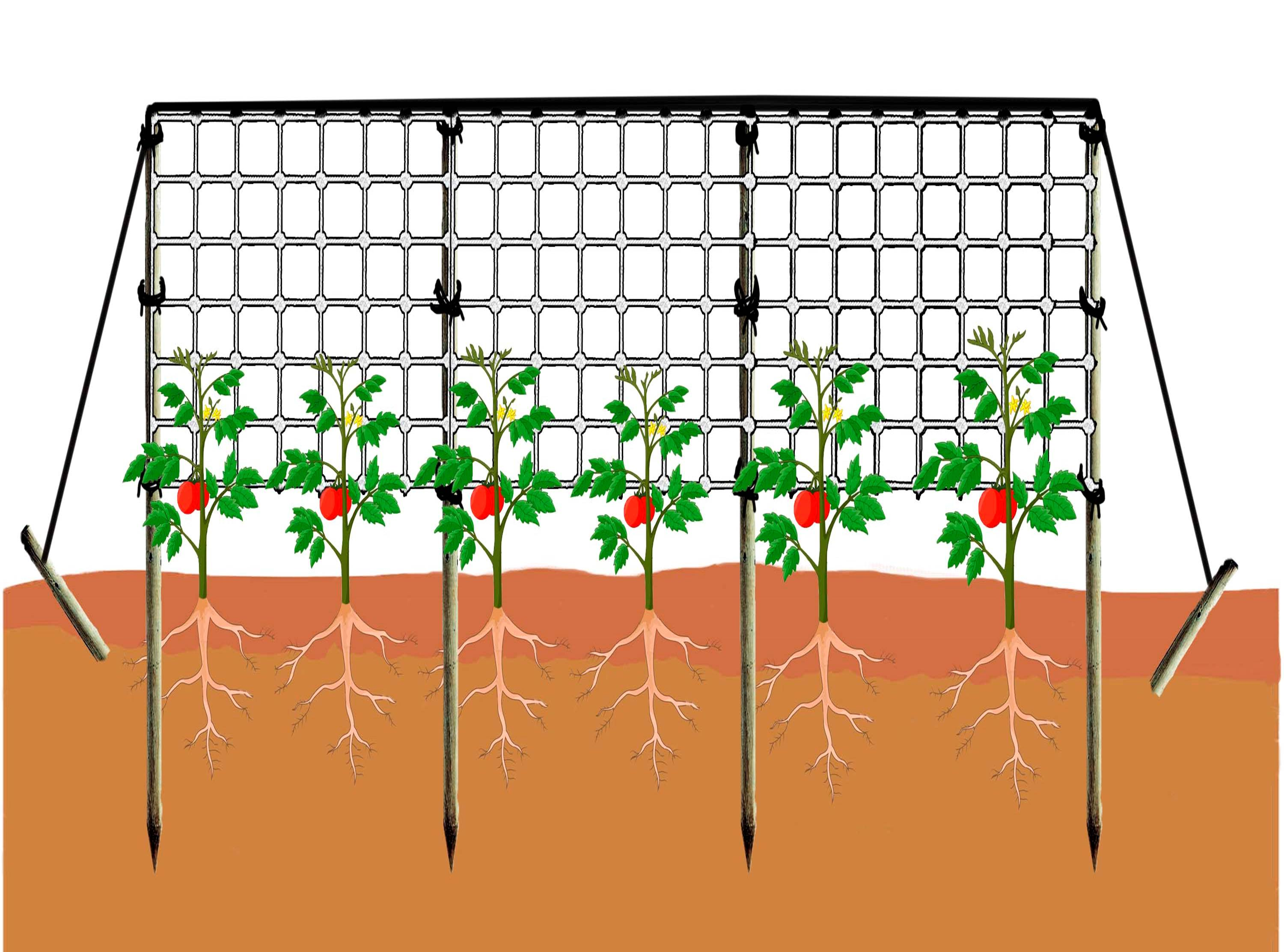 Los cables tensores anclados a las orillas del surco actúan como soporte de la misma malla tutora